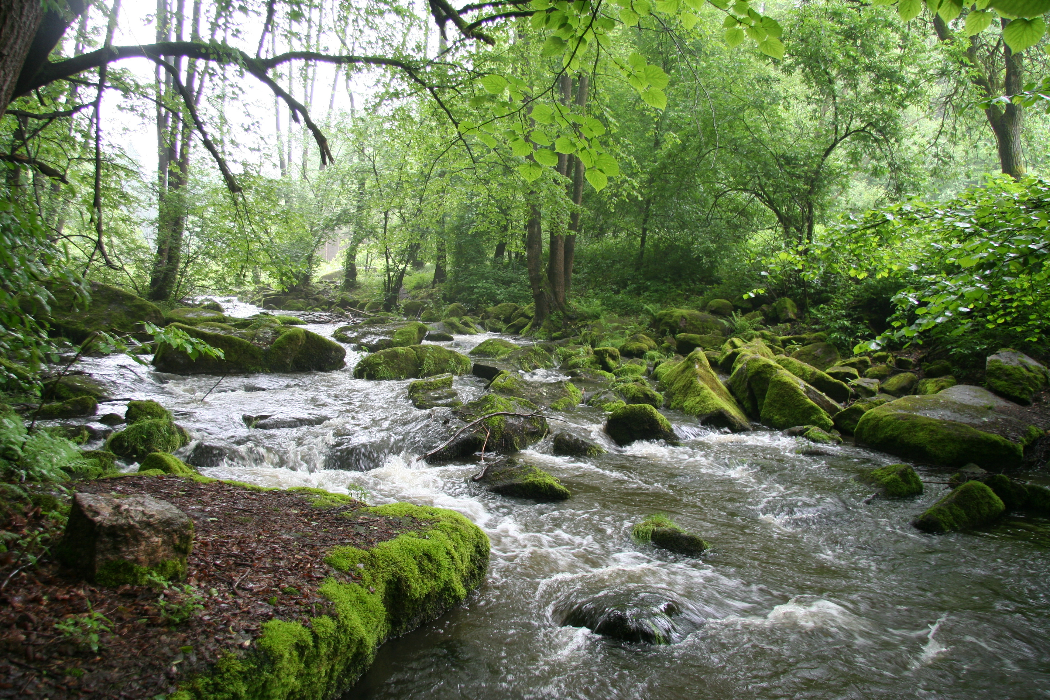 Das Crinitzer Wasser innerhalb des FFH-Gebietes "Crinitzer Wasser und Teiche im Kirchberger Granitgebiet"